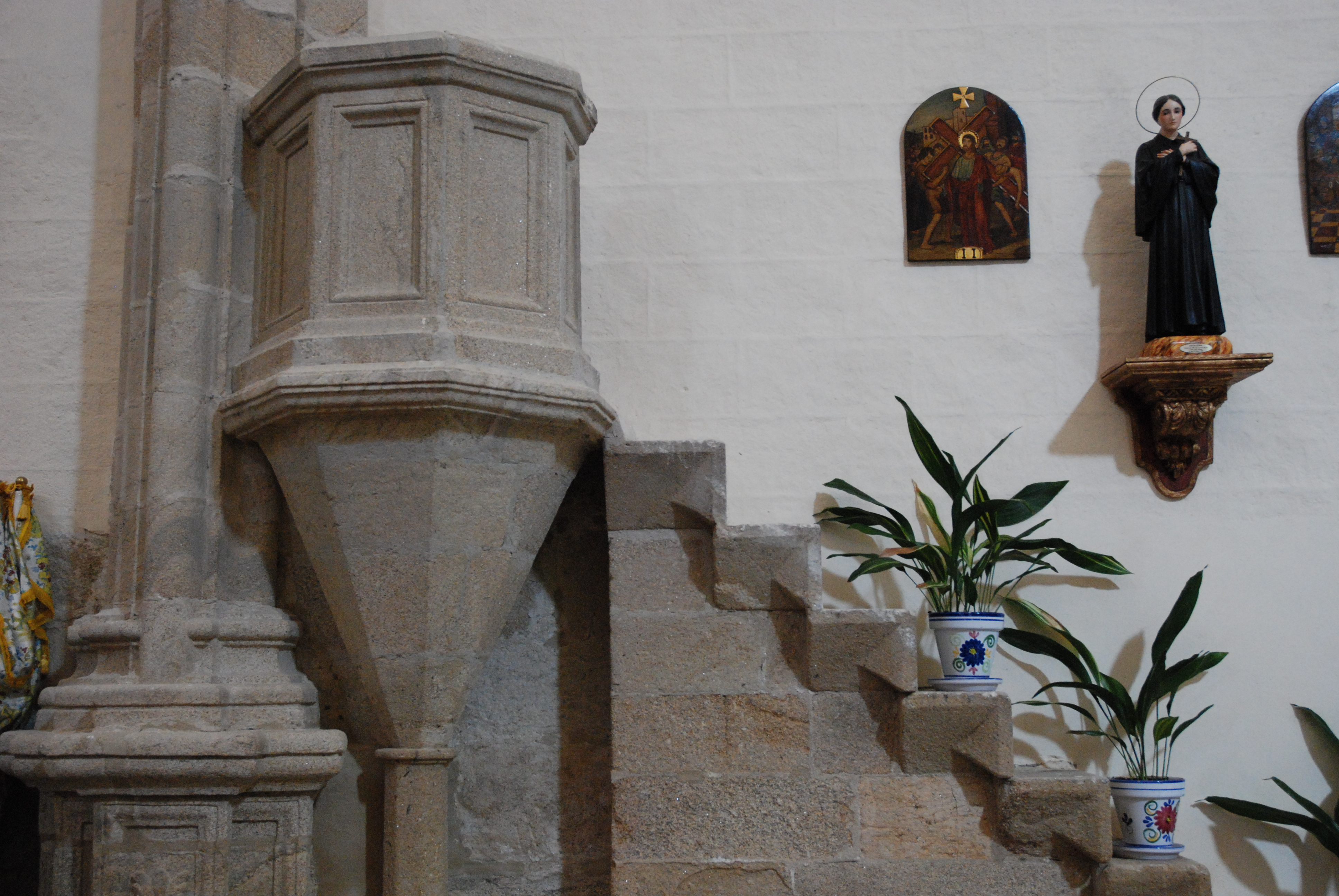 Púlpito (finales sigl. XVI) de la iglesia de San Juan Bautista en Saucedilla, Cáceres